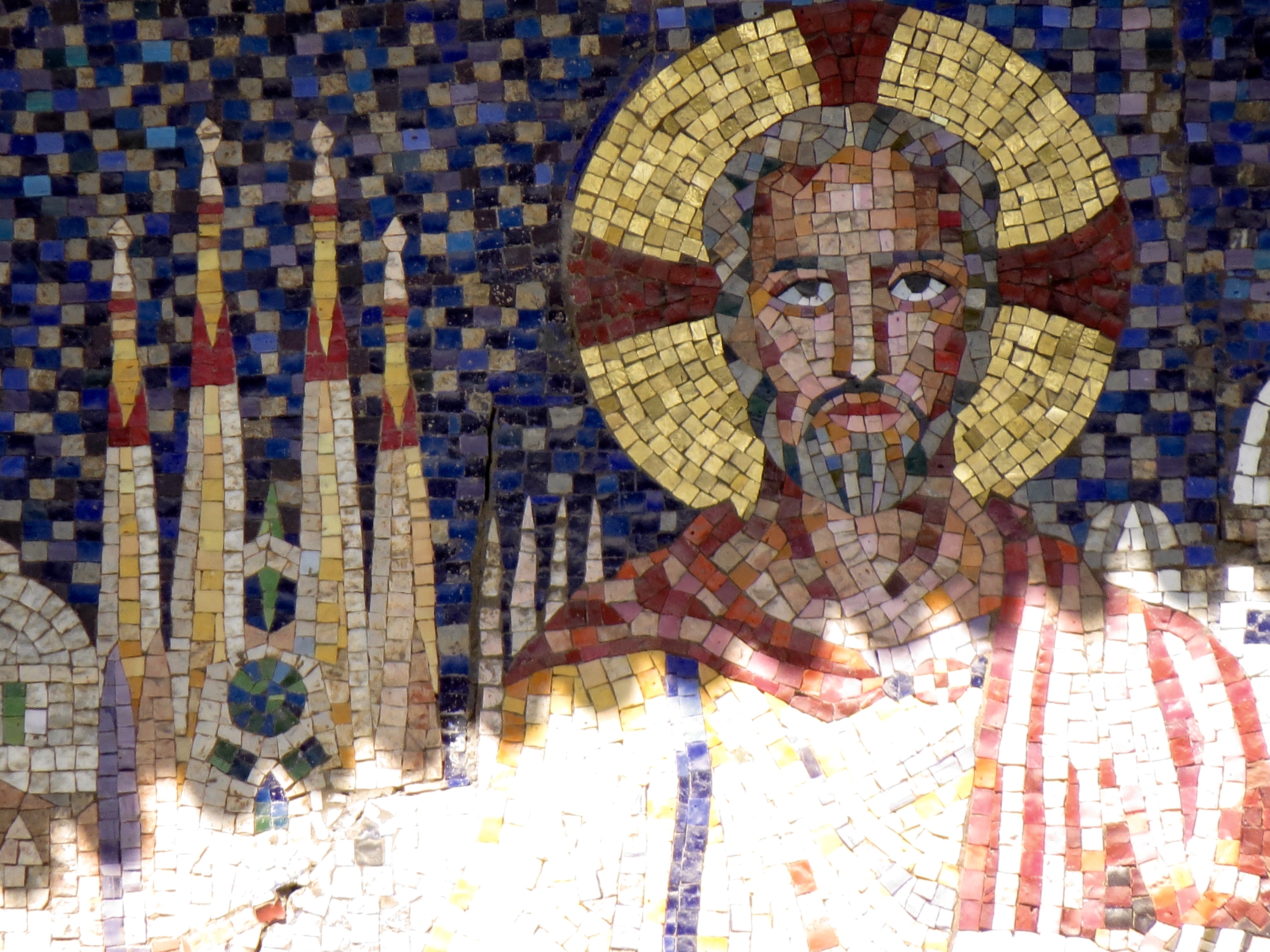 detalle del mosaico de la puerta de entrada principal en la calle Diputació 231 de Barcelona